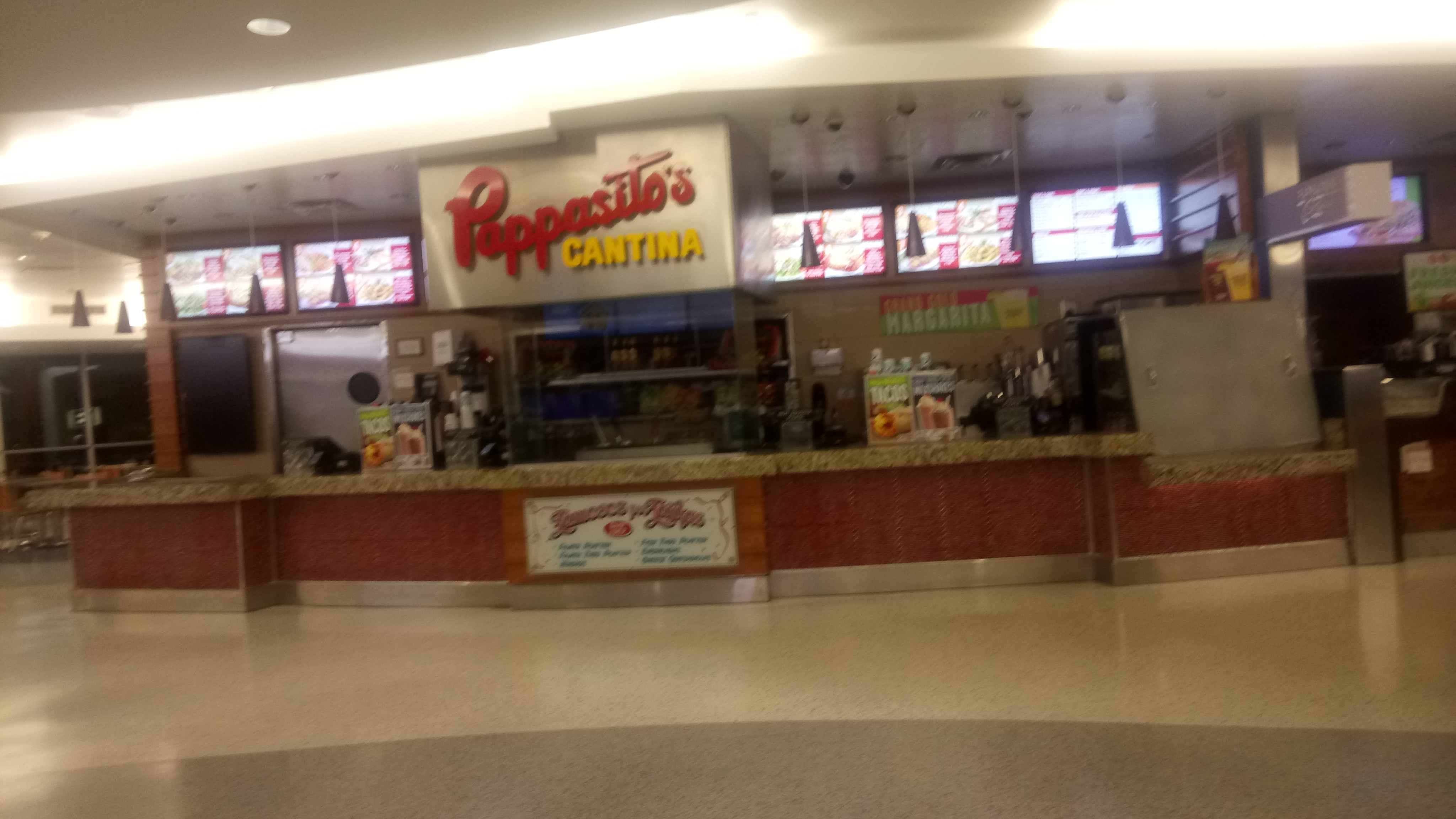 Pappasito's in Terminal E